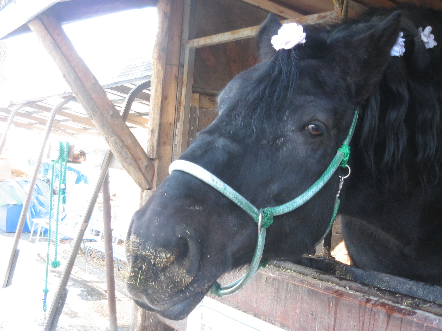 リッキー (ばんえい馬)